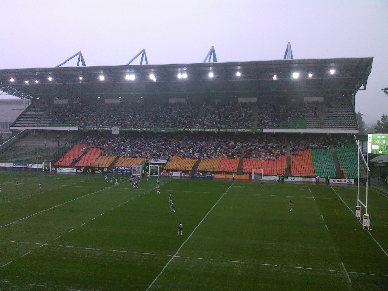 Demi-finale aller du championnat 2009-2010 de Fédérale 1 (France, rugby à XV), au stade Geoffroy-Guichard (Saint-Etienne). Victoire du CASE (Saint-Etienne, en vert) contre l'USBPA (Bourg-en-Bresse, en violet).